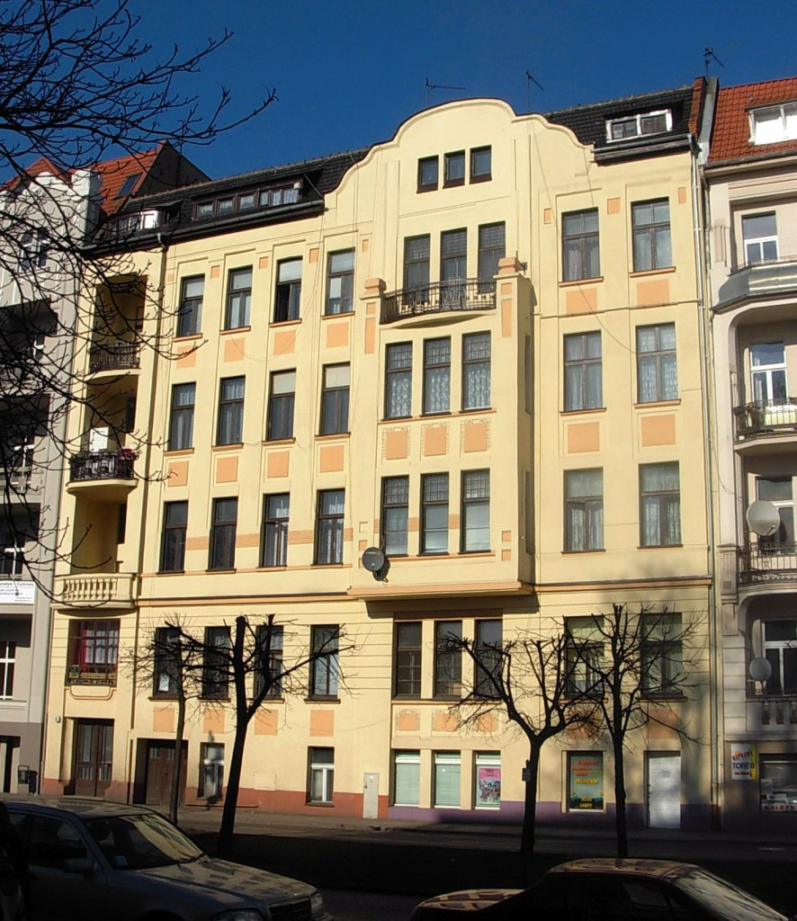 Kamienica ul. Mickiewicza 5 w Bydgoszczy, proj. Rudolf Kern, 1906